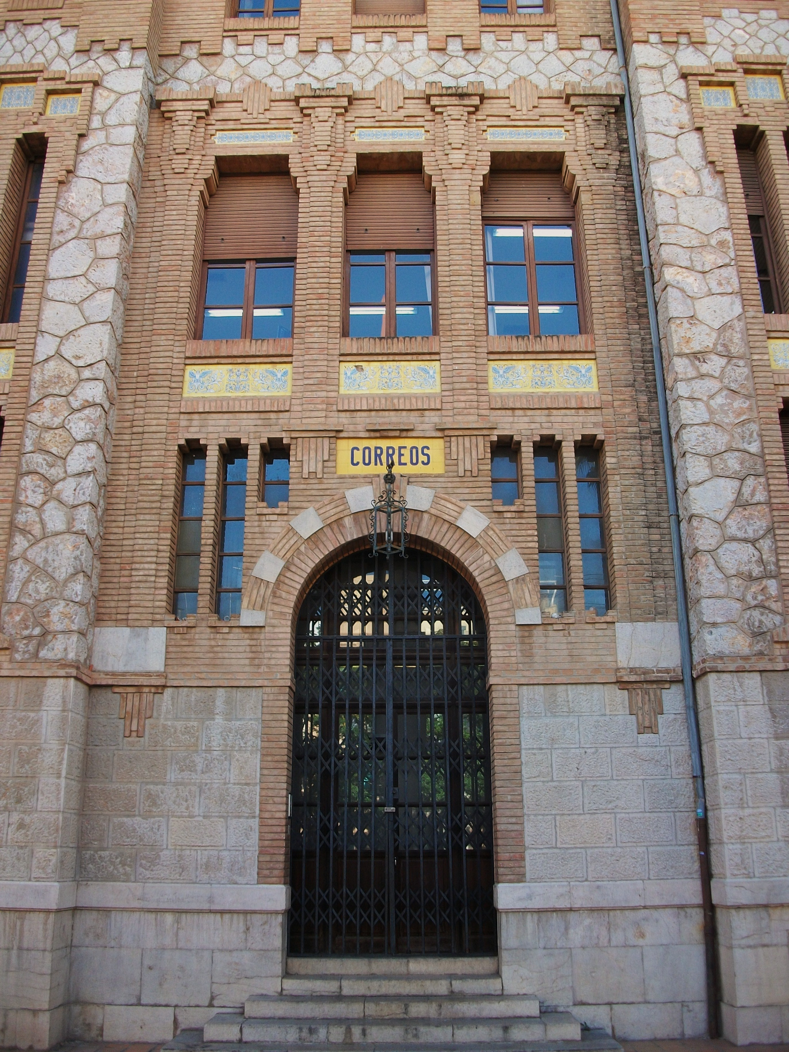 Correus i telègrafs, Castelló de la Plana.